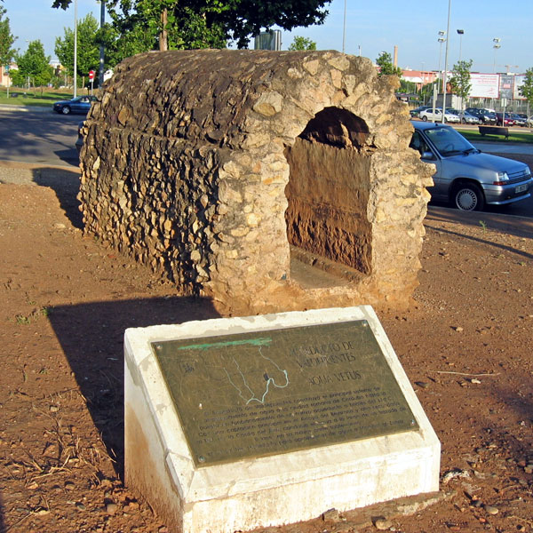 Restos del Acueducto de Valdepuentes (Aqua Vetus) encontrados en la zona de La Arruzafilla y situados como monumento junto a la Glorieta de Santa Beatriz, en Córdoba (España).